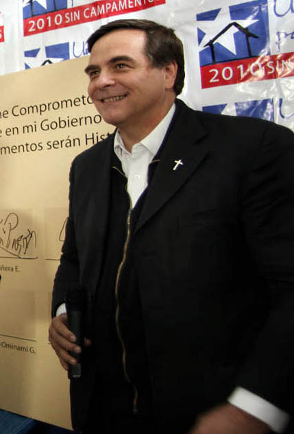 Felipe Berríos, sacerdote jesuíta chileno.